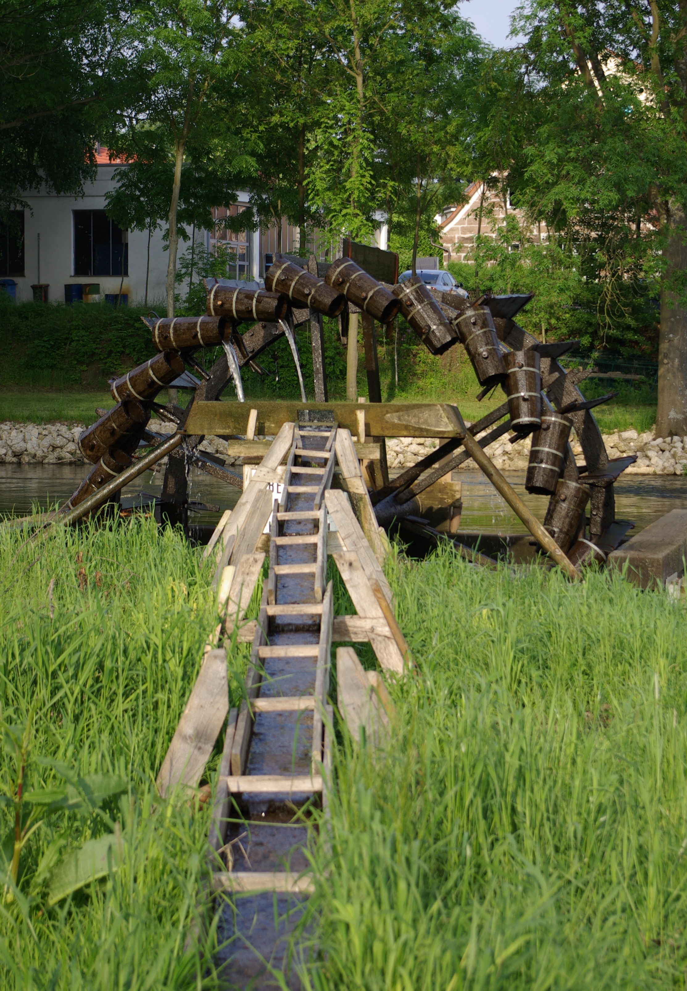 Wasserschöpfrad im Erlanger Stadtteil Bruck